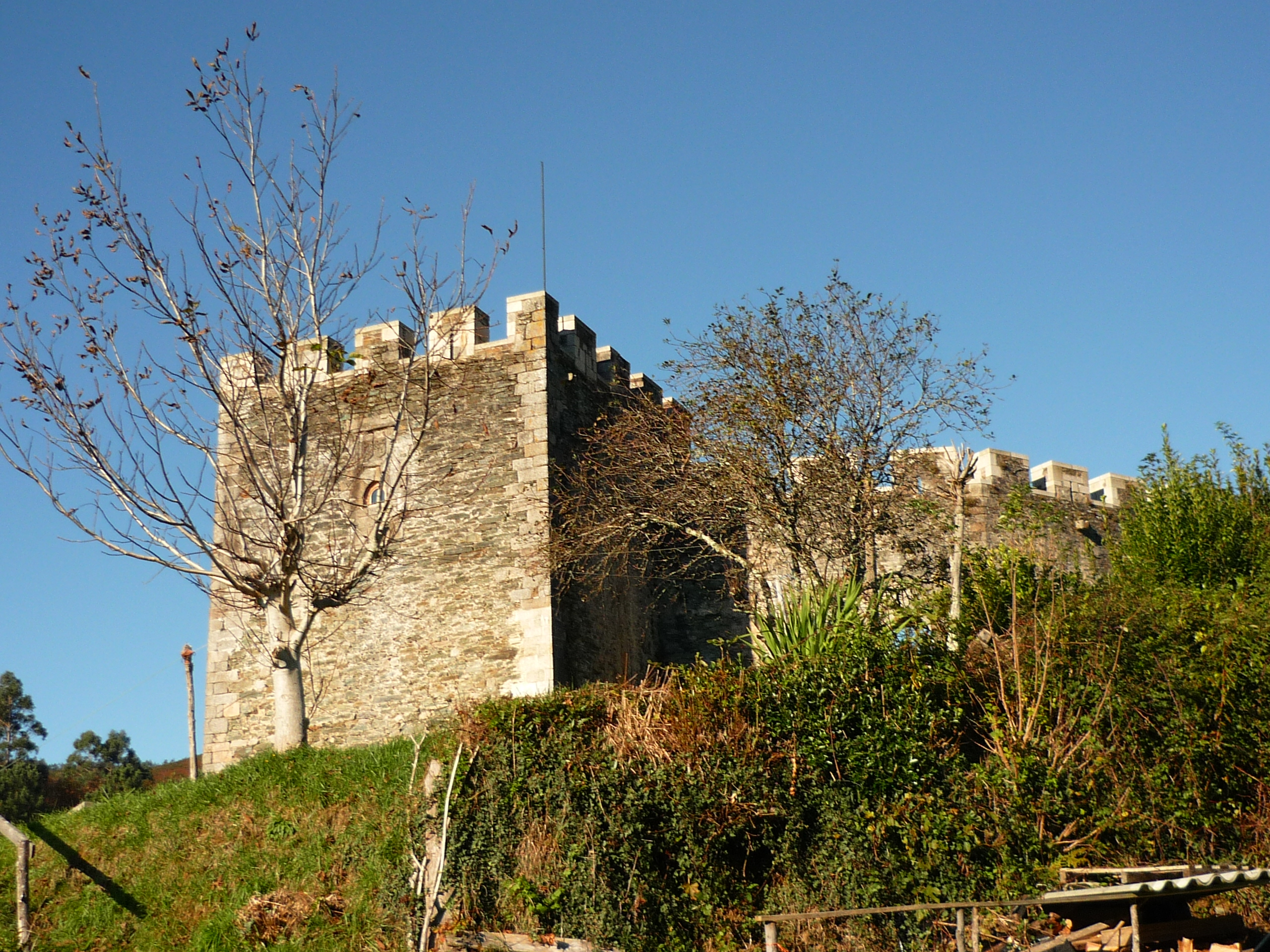 NO Concello do mesmo nome (provincia de A Coruña) NO Concello do mesmo nome (provincia de A Coruña)